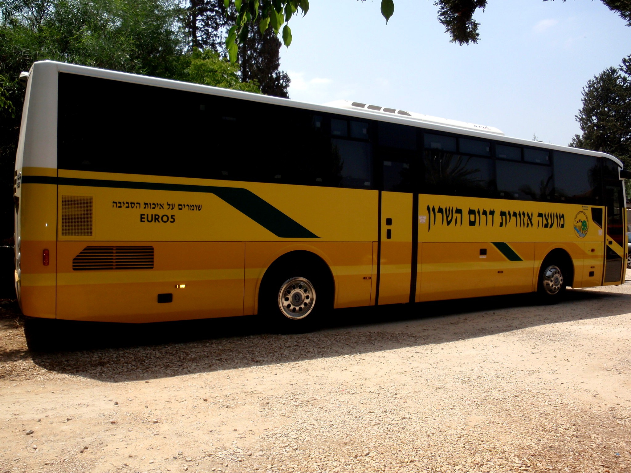 מבוא מודיעין